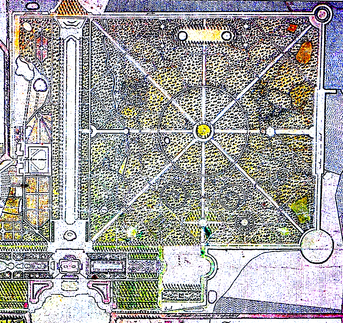 Старый план замкового парка Бенрат (Дюссельдорф).